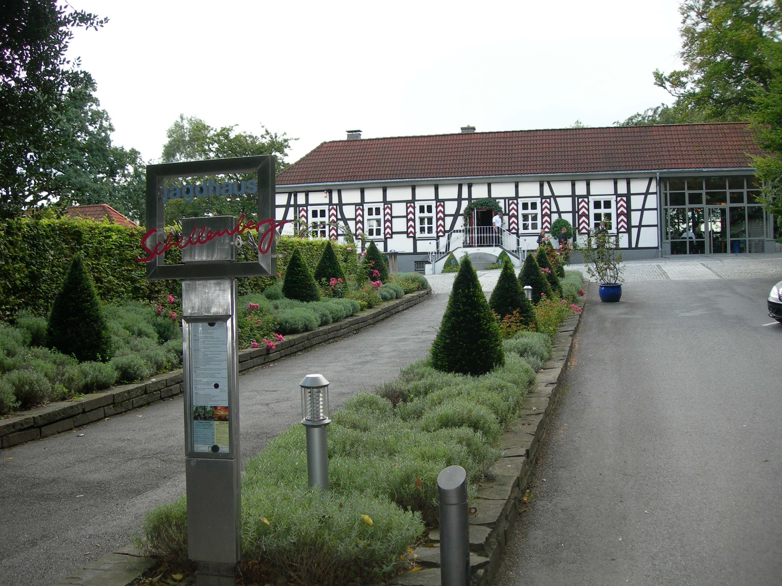 Jagdhaus Schellenberg, Essen-Heisingen, jetzt Restaurant